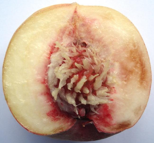 Pfirsich: Roter Ellerstädter - halbiert